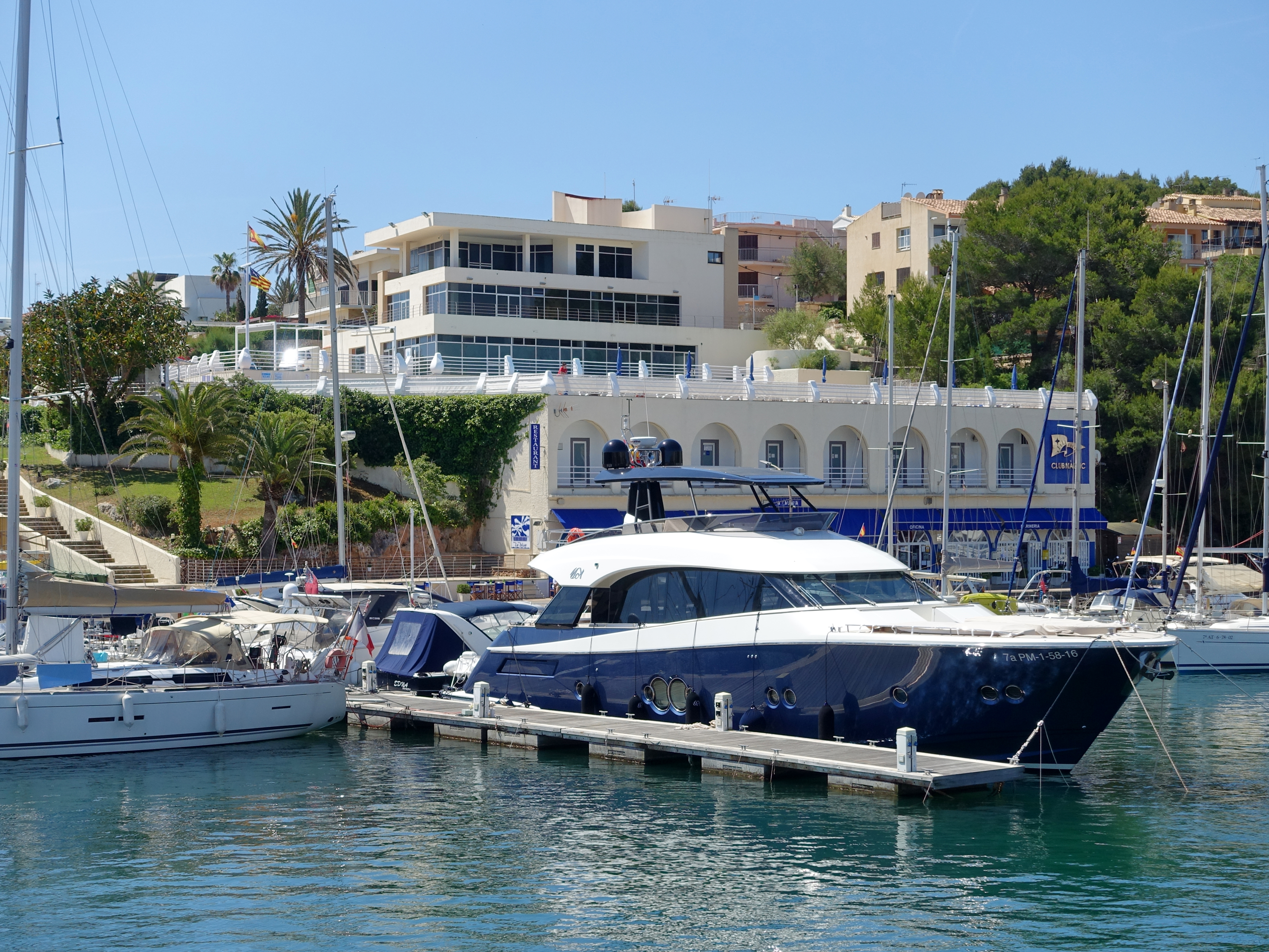 Club Nàutic am Hafen von Porto Cristo in der Gemeinde Manacor, Mallorca, Spanien